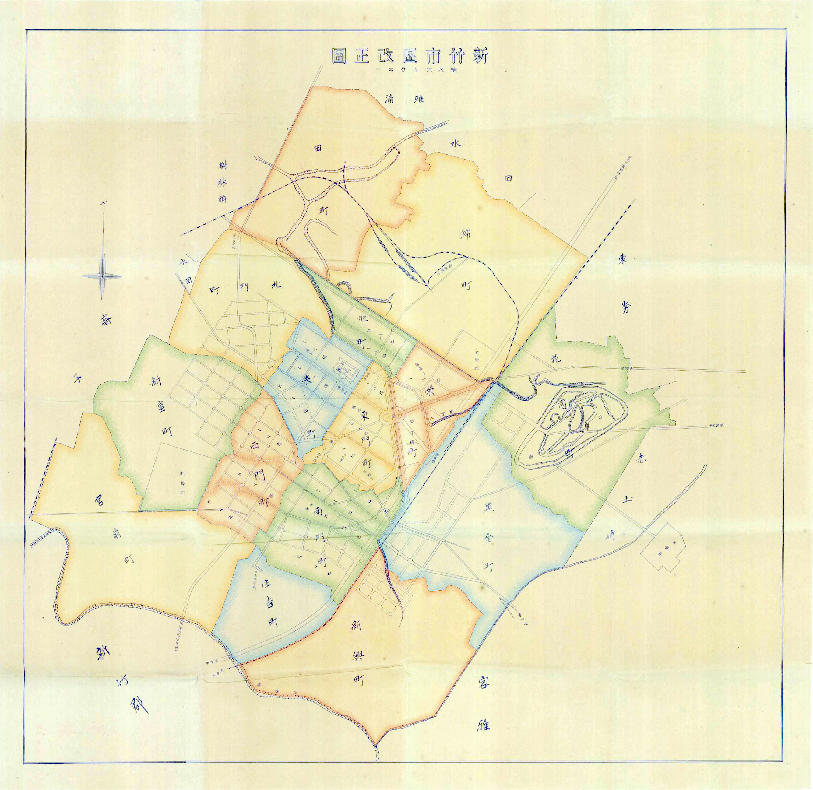 中文（台灣）: 新竹市於1935年實施町名改正，公布了15個町名，包含花園町、黑金町、新興町、住吉町、宮前町、新富町、北門町、旭町、表町、 榮町、東門町、西門町、南門町、田町、錦町。底圖來自《 新竹市區改正圖》